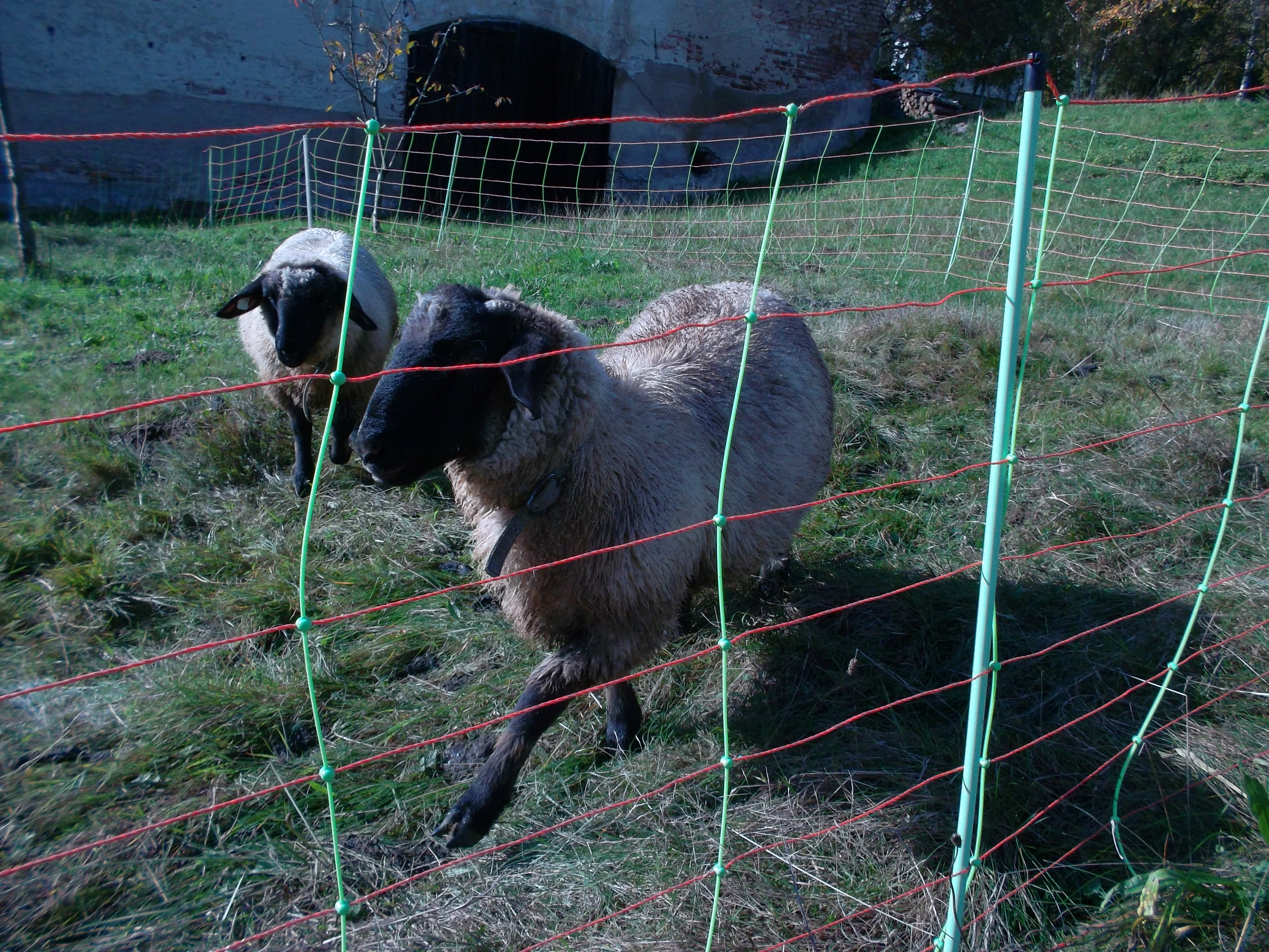 Schafe auf einer Wiese in Kleinpostwitz